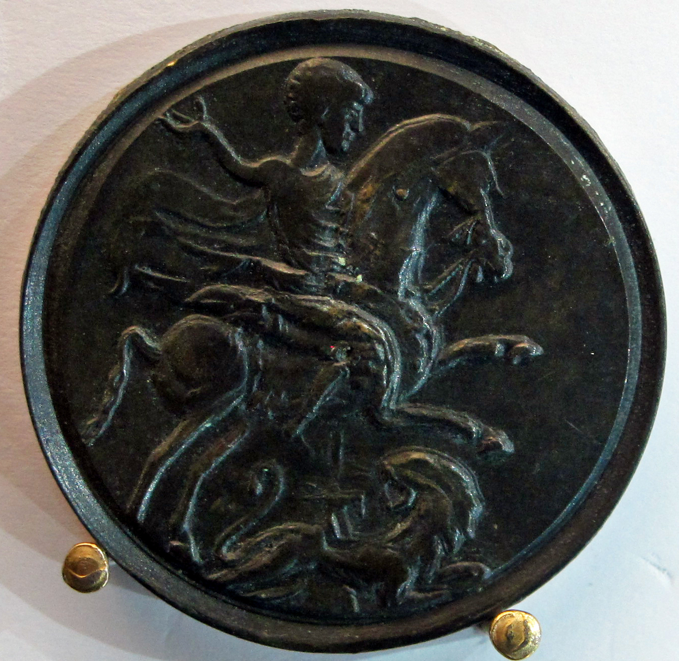 Medaglione contorniato di alessandro magno, bellerofonte su pegaso che combatte la chimera